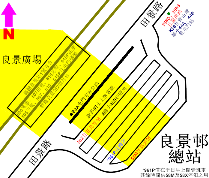 中文（香港）: 良景邨巴士總站(含附近輕鐵站)的平面圖